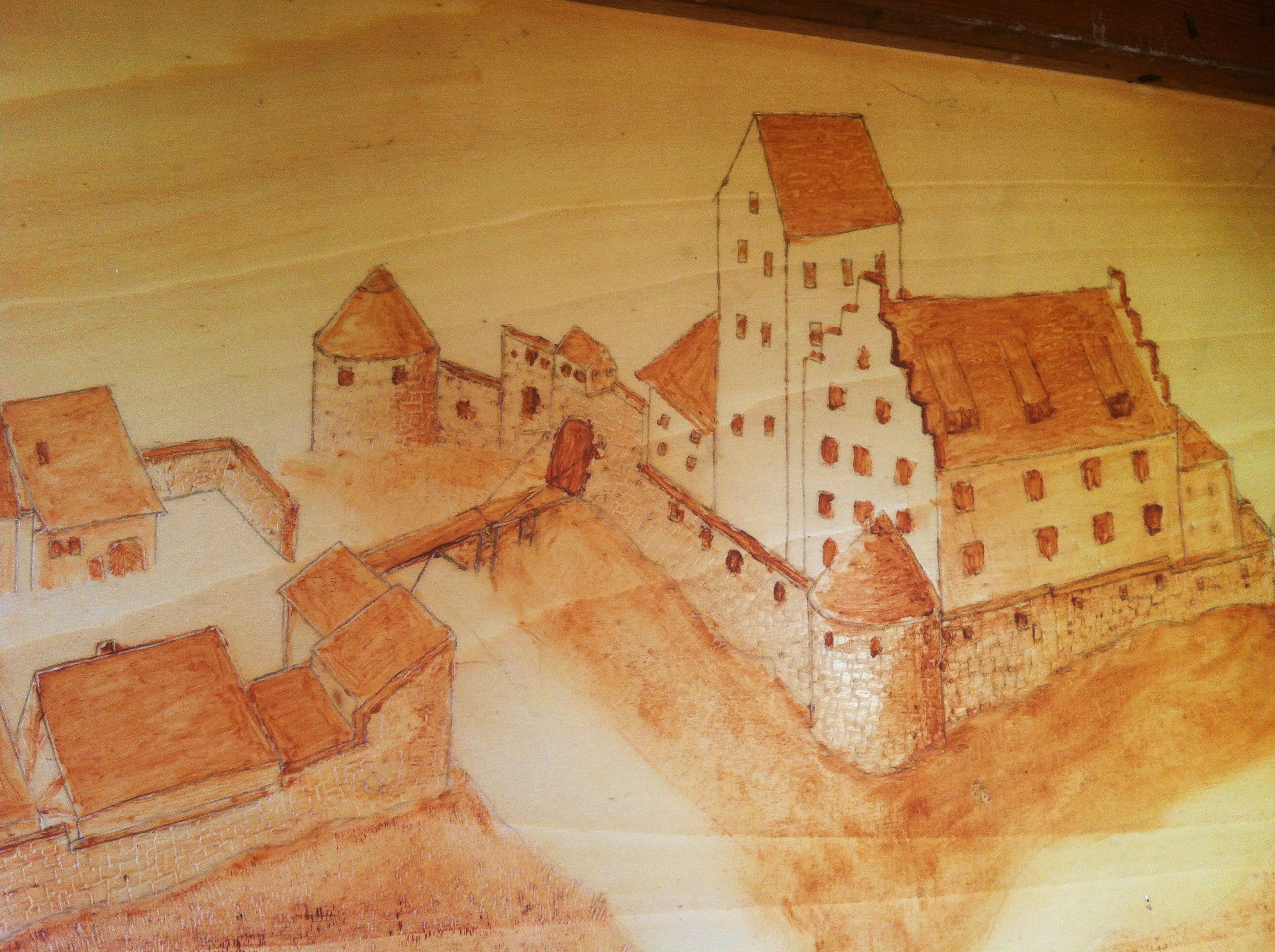 Geschichte der Stadt Blumberg im Schwarzwald-Baar-Kreis. Zeichnung der Burg Blumberg auf der Infotafel an der Stelle der ehemaligen Burg.